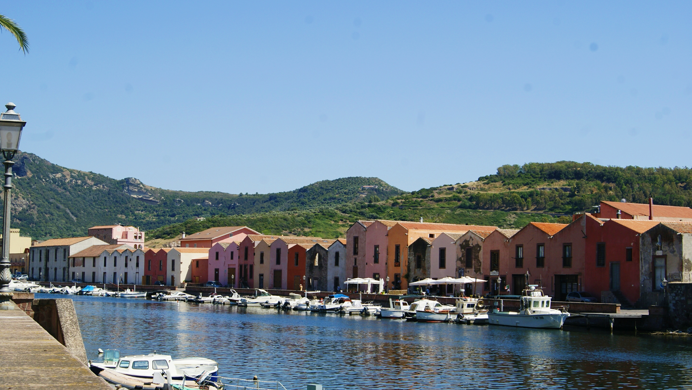 Le vecchie concerie di Bosa